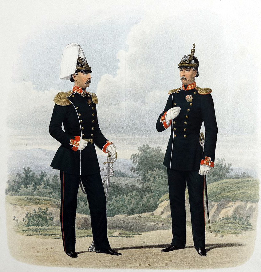 Л.Гв. Преображенский полк. Штаб-Офицер (воскресная) и Обер-Офицер (обыкновенная формы.) 22 Декабря 1872.